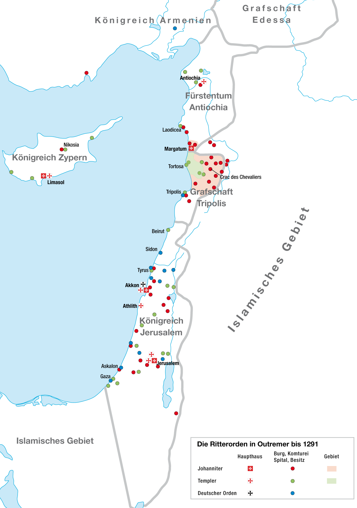 Besitzungen und Stützpunkte der europäischen Ritterorden in Outremer bis 1291.